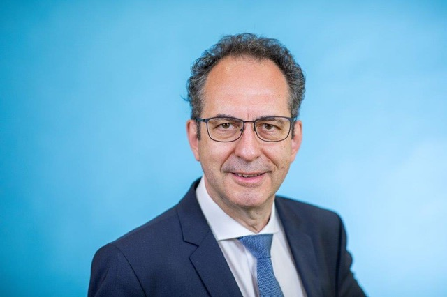 Das ist der Deutsche Botschafter in der Schweiz und in Liechtenstein, Herr Dr. Norbert Riedel.